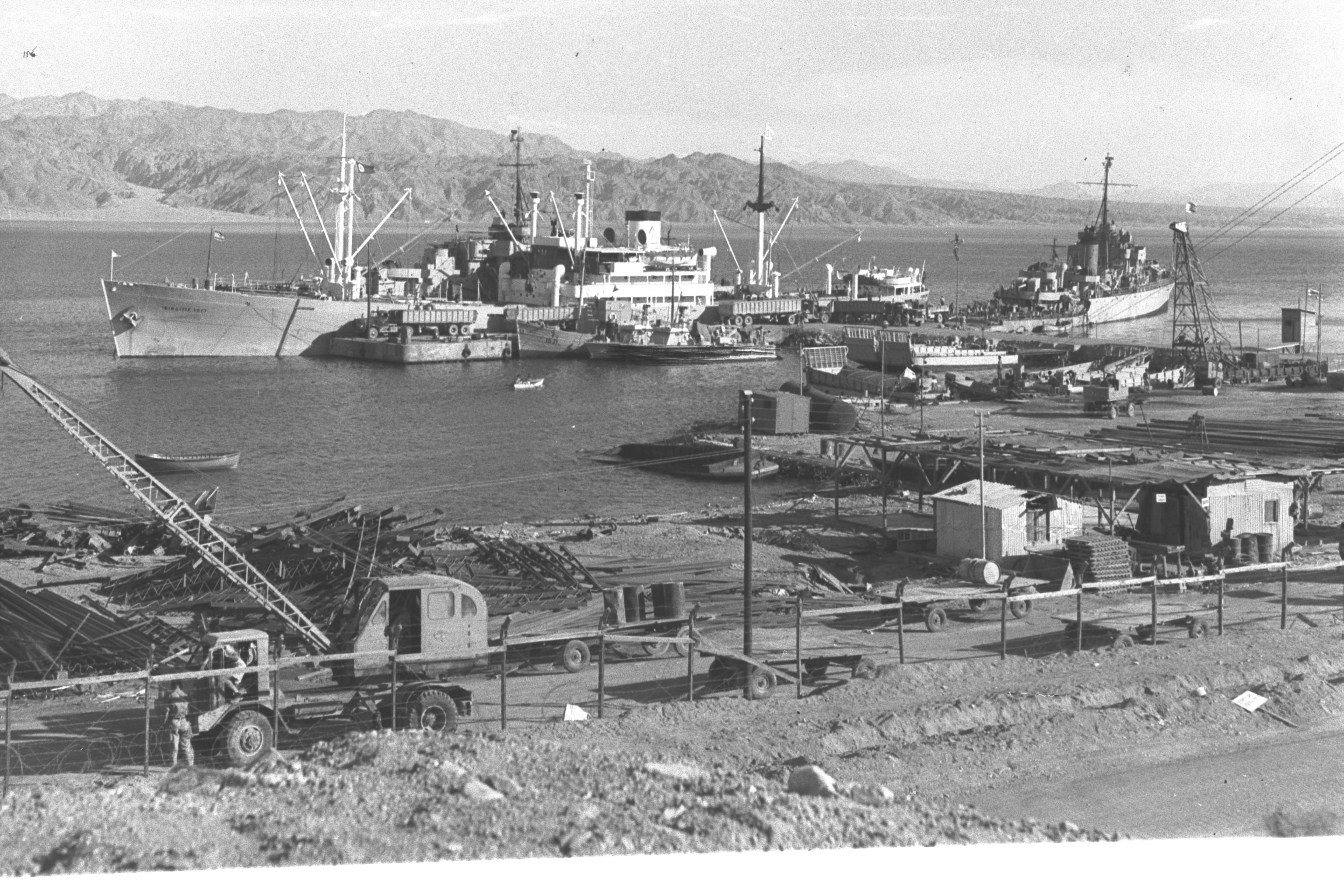 האוניה הדנית בריגיטה טופט וספינת חיל הים מיזנק בנמל אילת